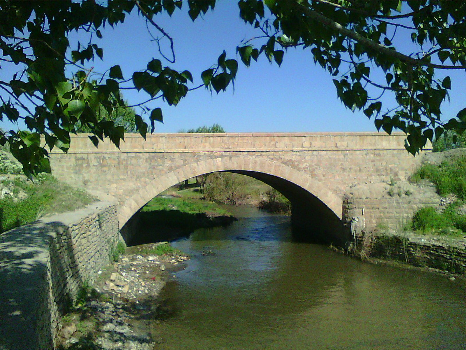 پل بتونی صالح‌آباد